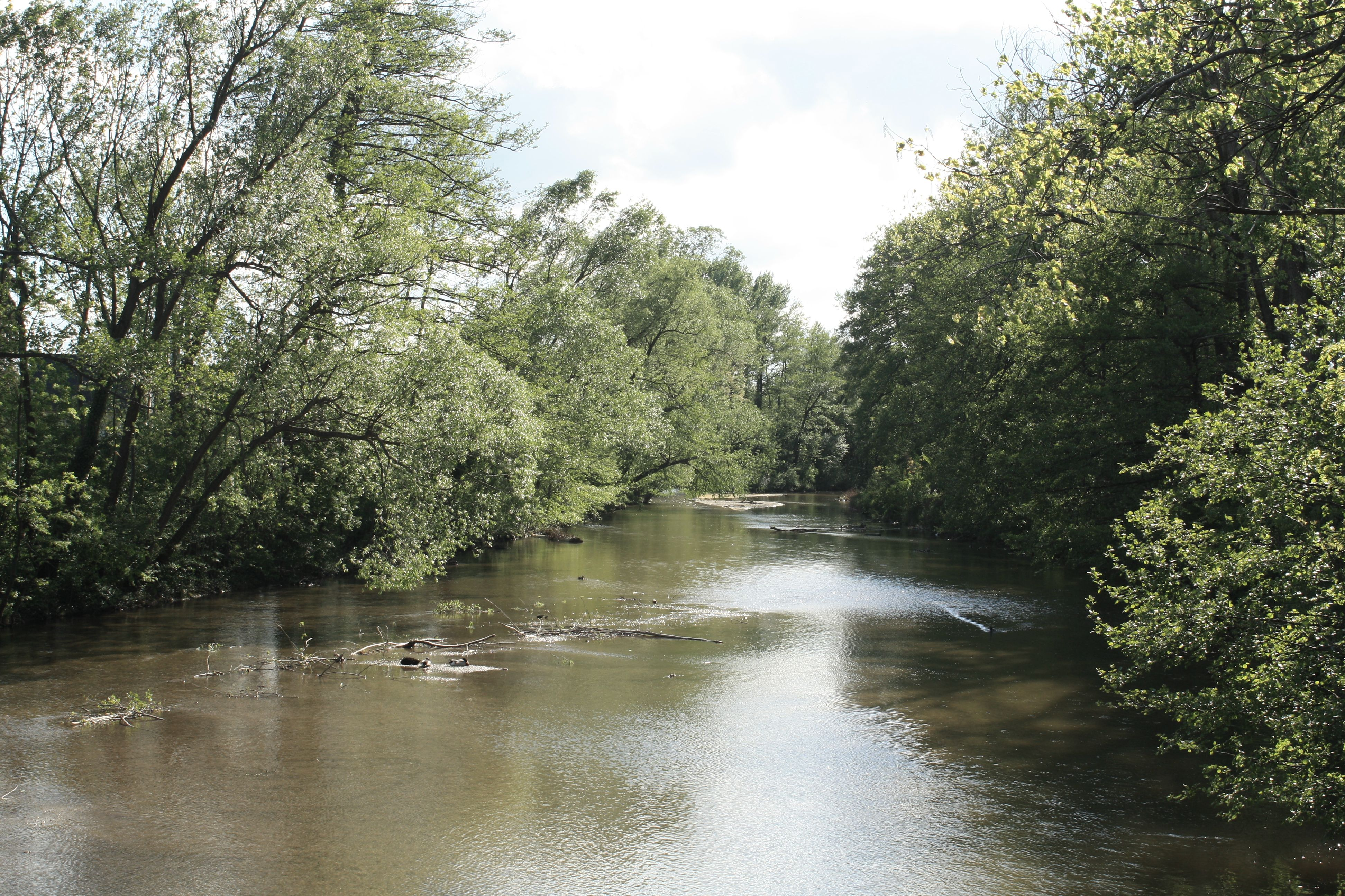 Piesting in Sollenau in Niederösterreich